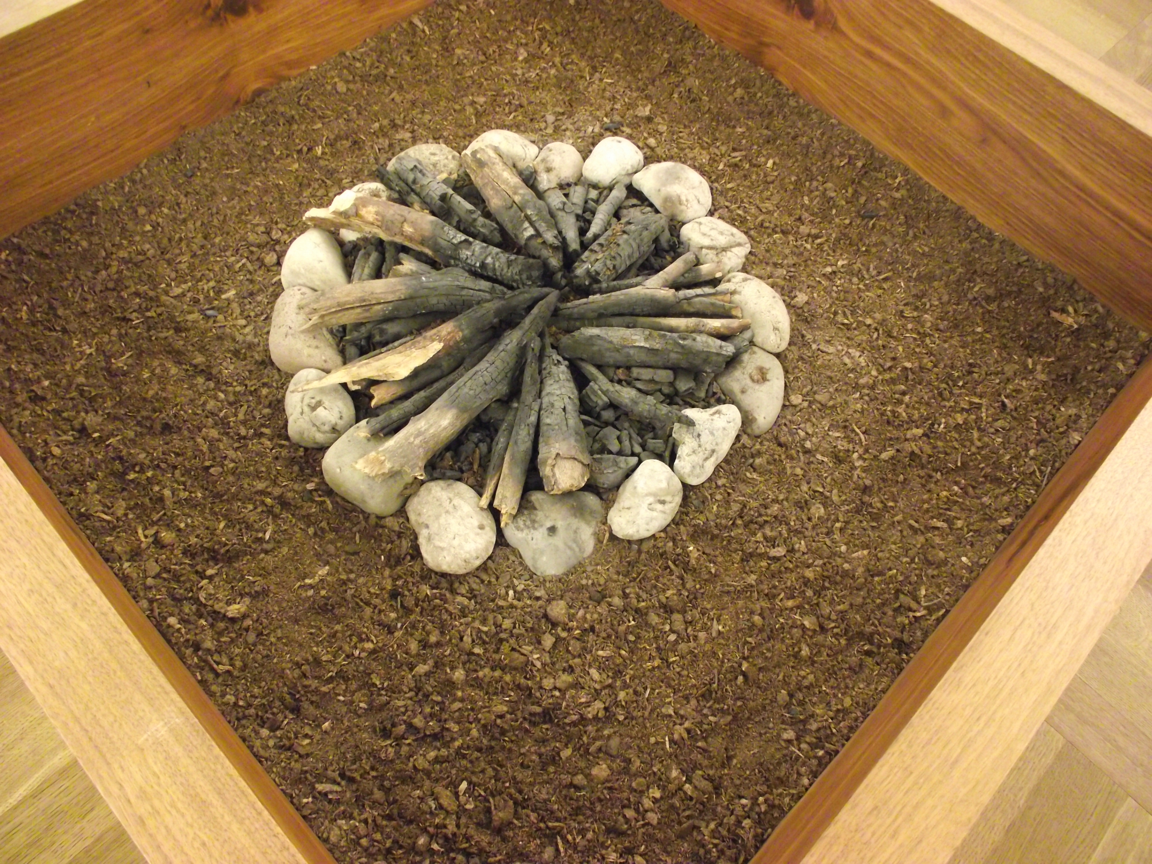 Bled